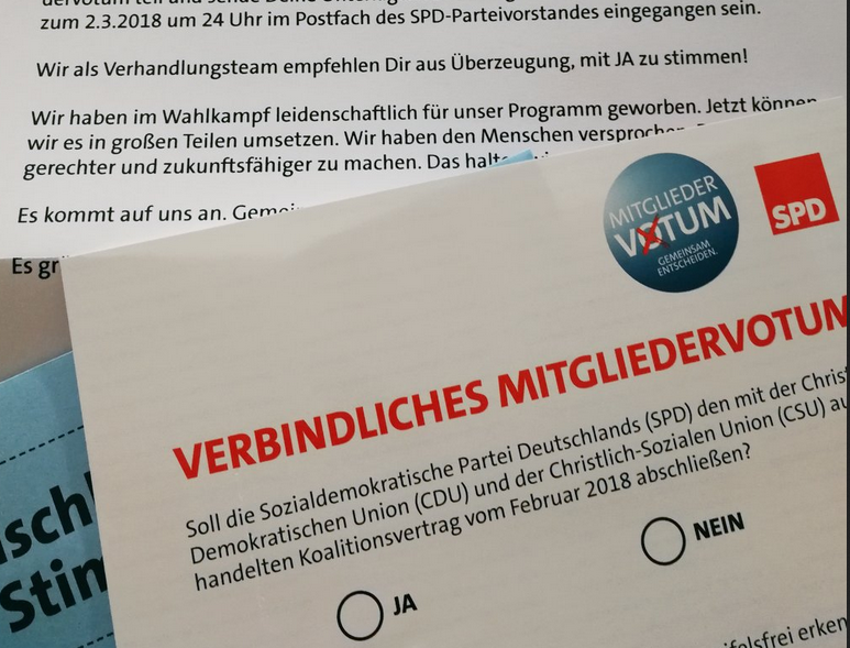 Foto der Abstimmungsunterlagen zum SPD Mitgliedervotum 2018 (mit GIMP bearbeitet und zu PNG konvertiert)